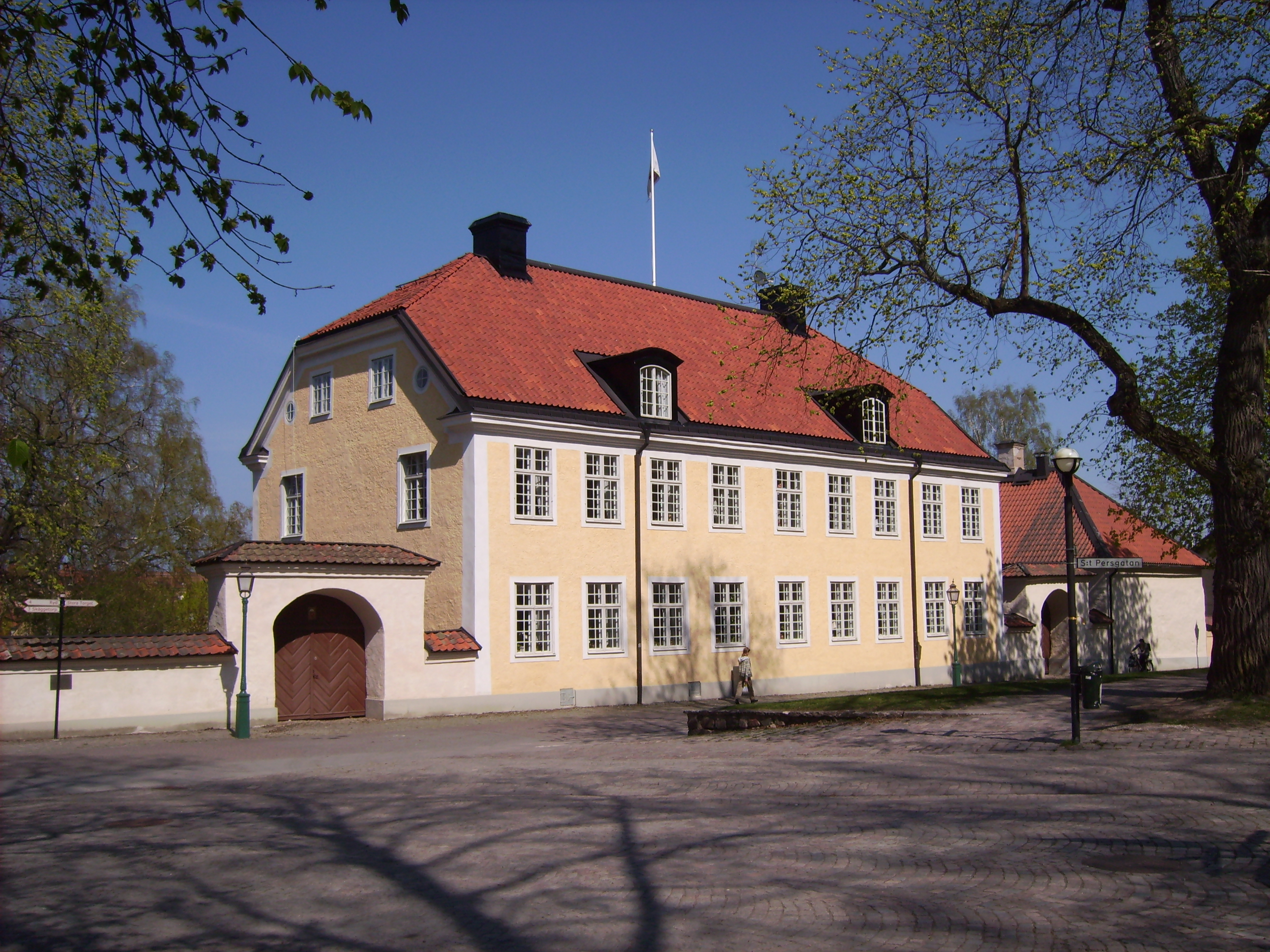 Biskopsgården vid Domkyrkoparken i Linköping